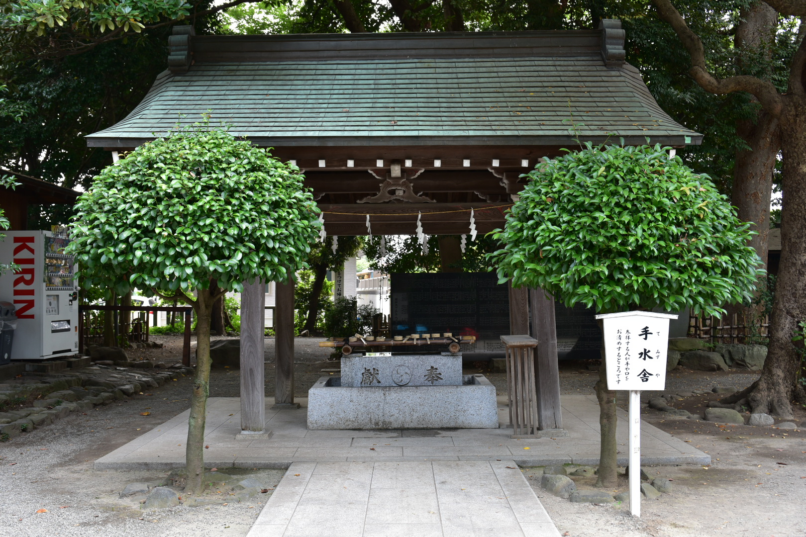 前鳥神社の手水舎（神奈川県平塚市）